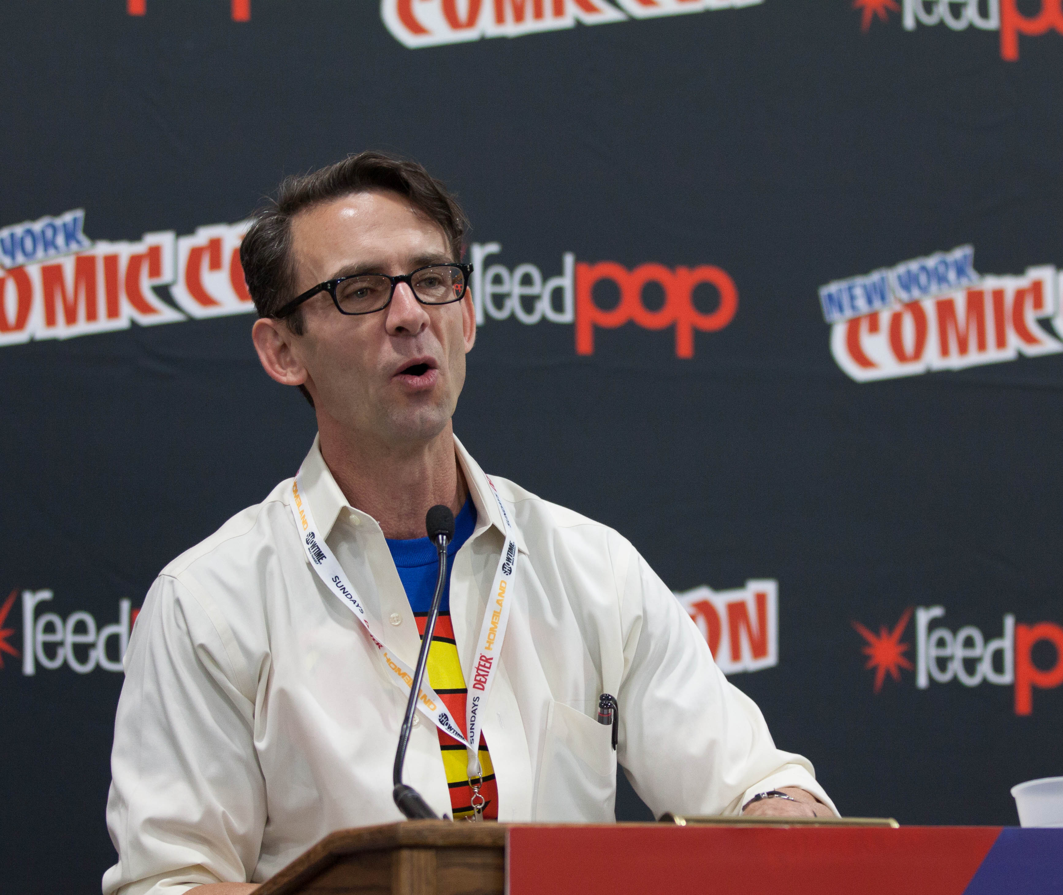 Chuch Palahniuk at New York Comic Con, 2012